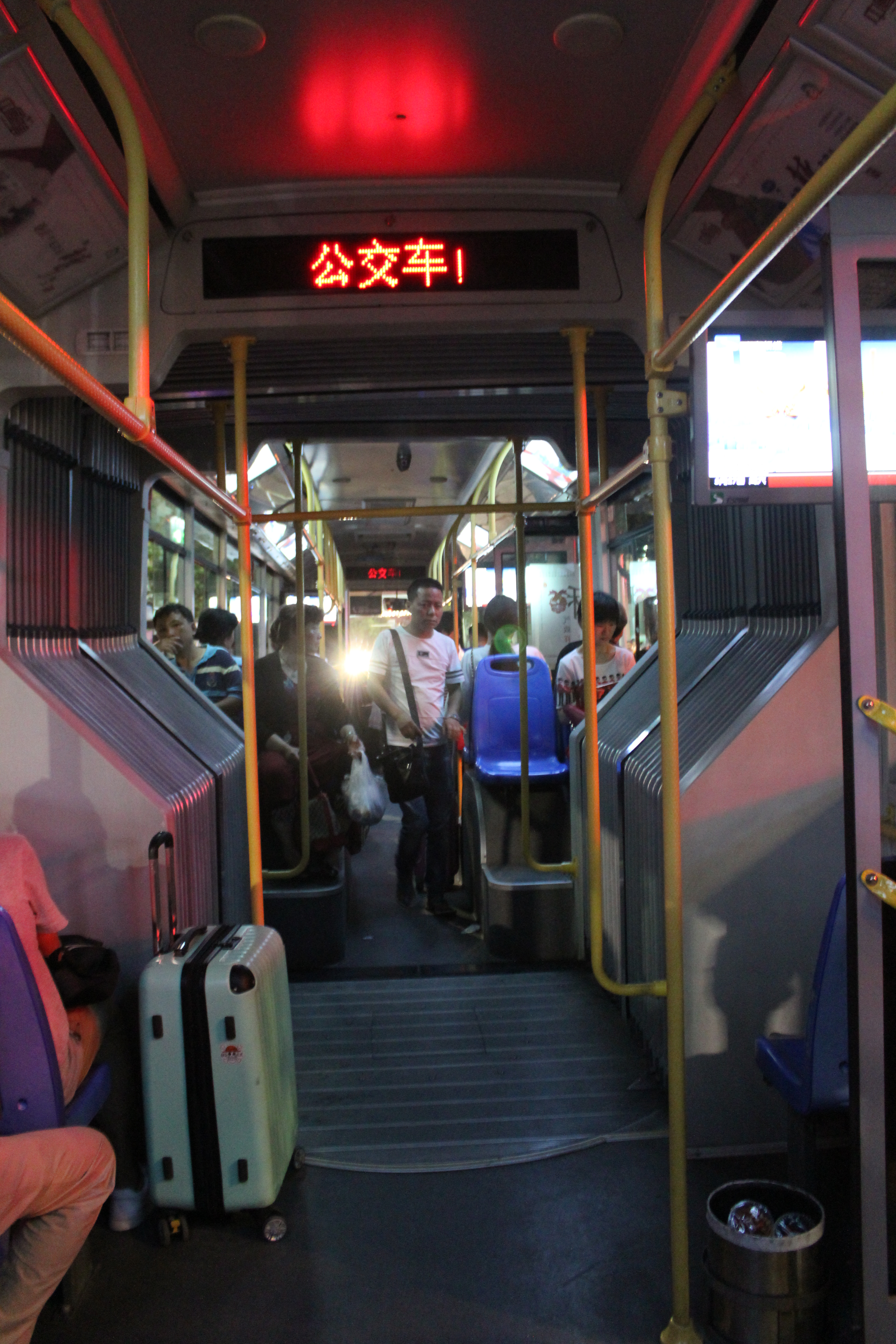 中文（中国大陆）: Bengbu bus No. 103 Interior